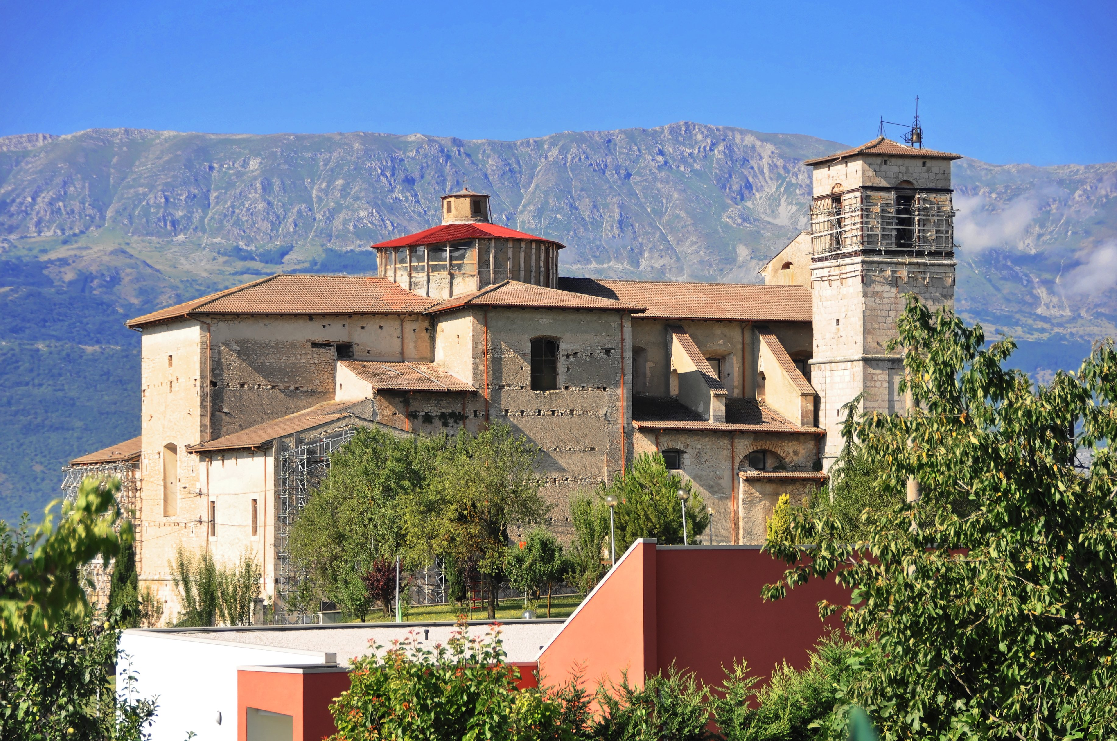 Poggio Picenze 2017